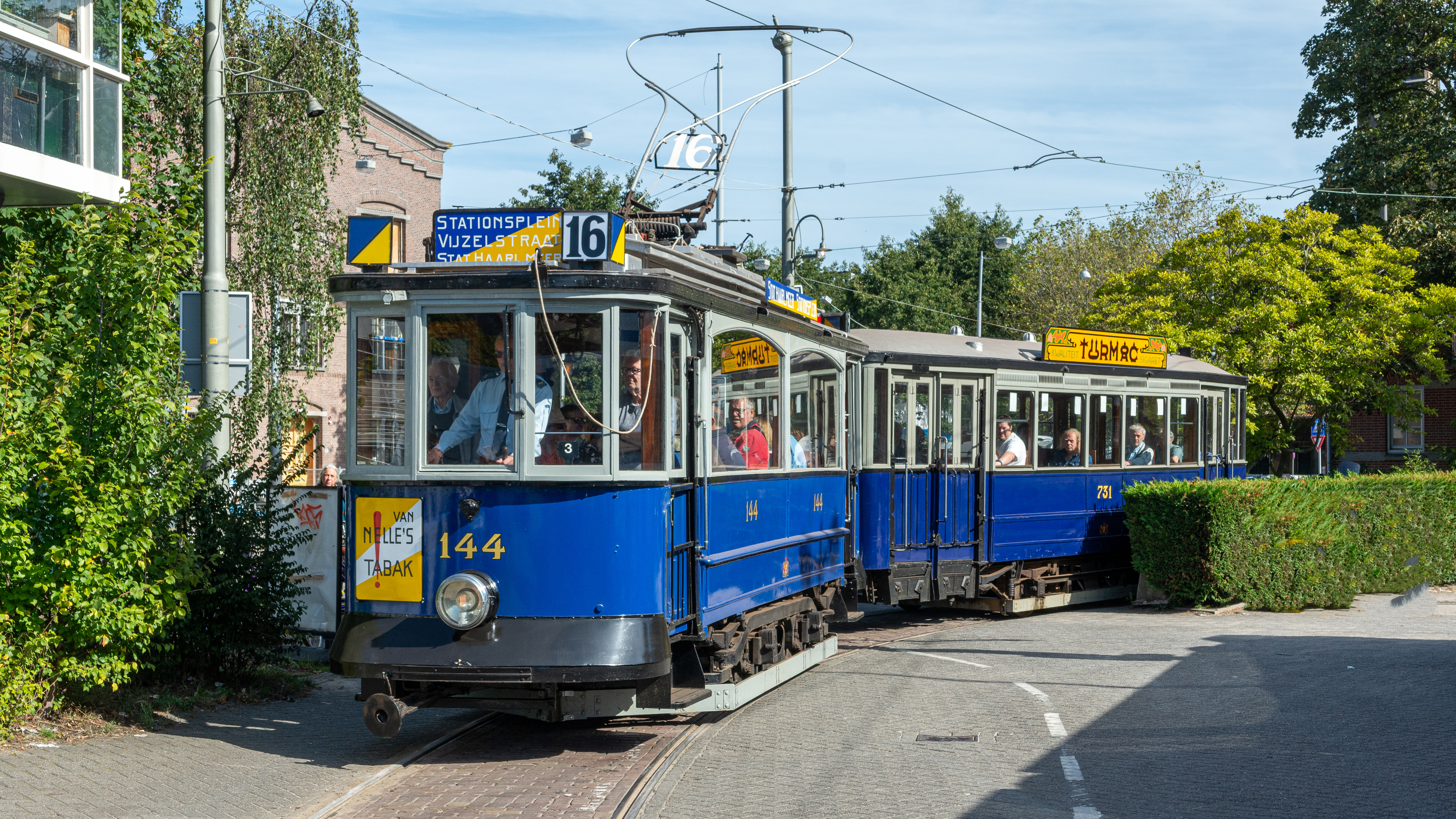 Zondag 22 september was de Amsterdamse dag Bij het Haarlemmermeerstation vertrok tram 144 met bijwagen 731 over de EMA museumlijn naar Bovenkerk